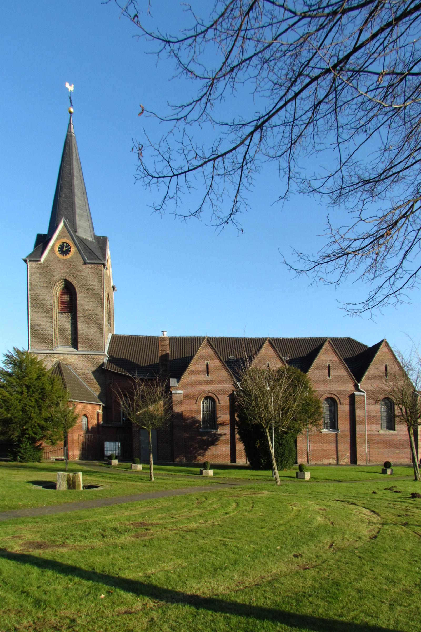 Kirchen und Kapellen in Geilenkirchen